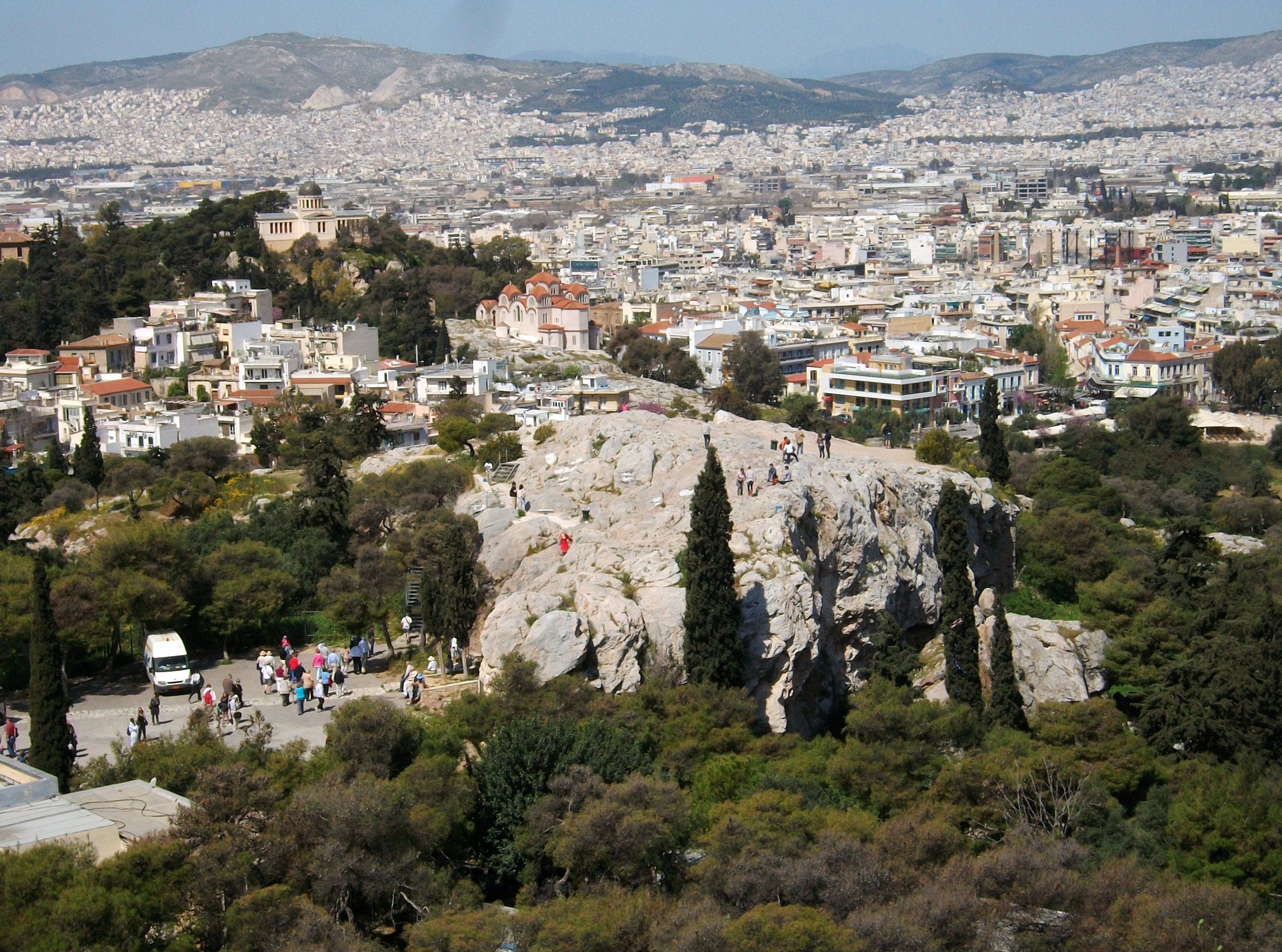 L'Areòpag des de l'Acròpoli, Atenes.